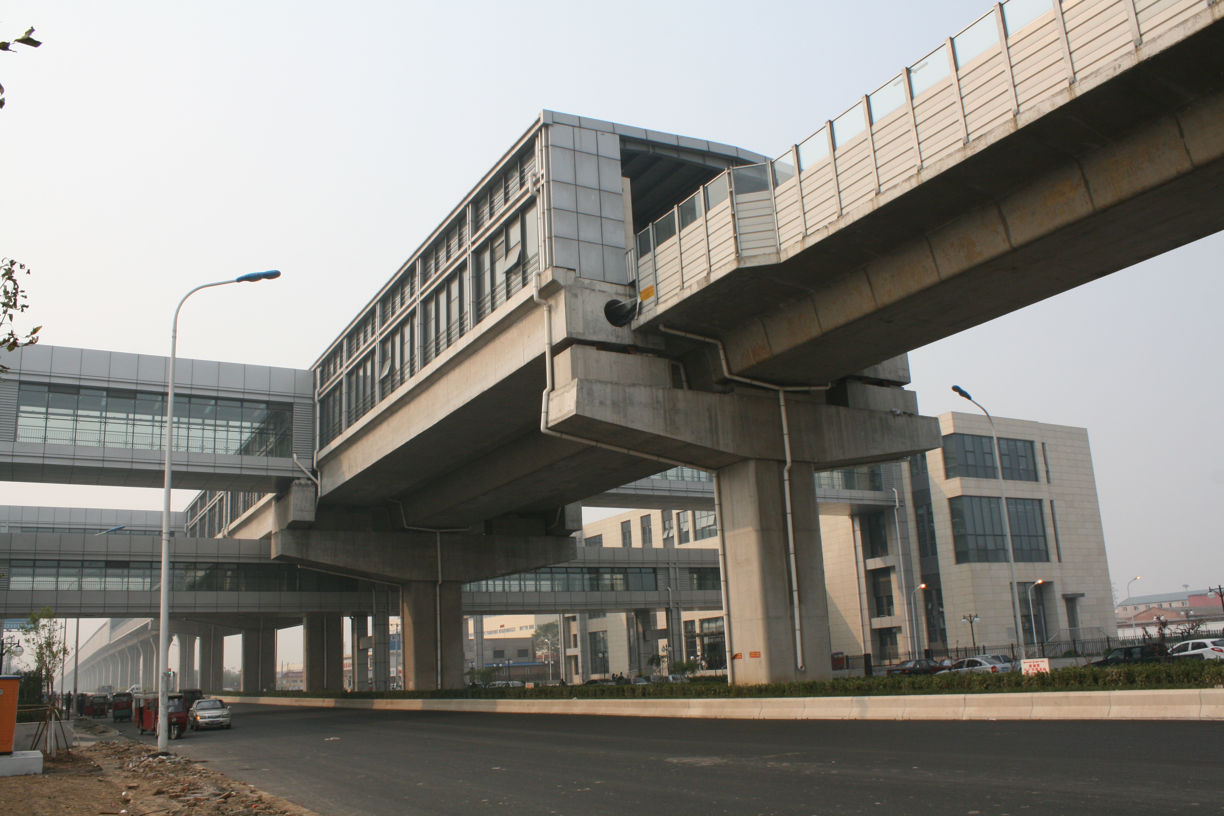 天津地鐵三號線華北集團站站體